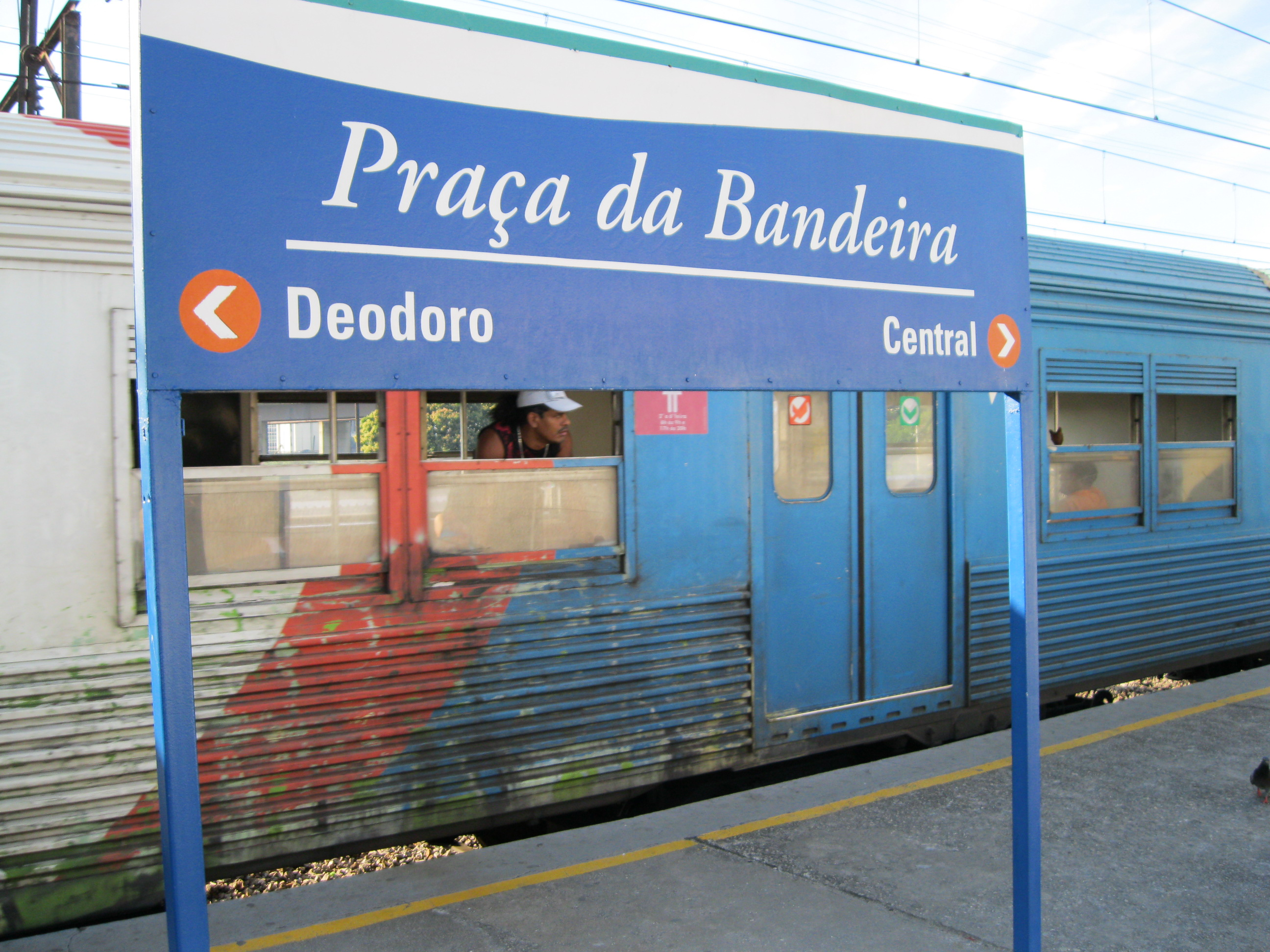 Vista da Estação da Praça da Bandeira, no Rio de Janeiro.